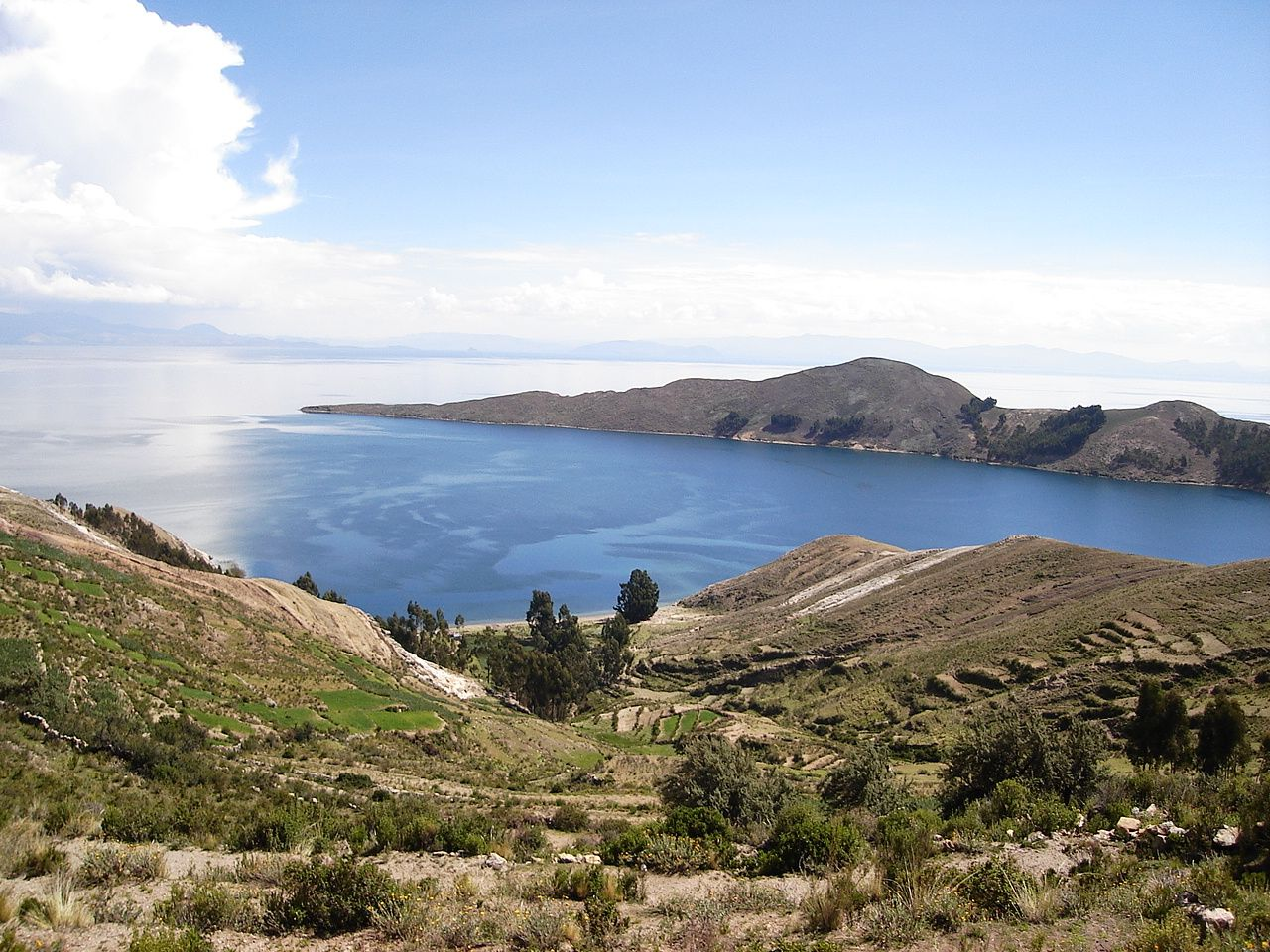 Foto tirada por mim, na Isla del Sol.